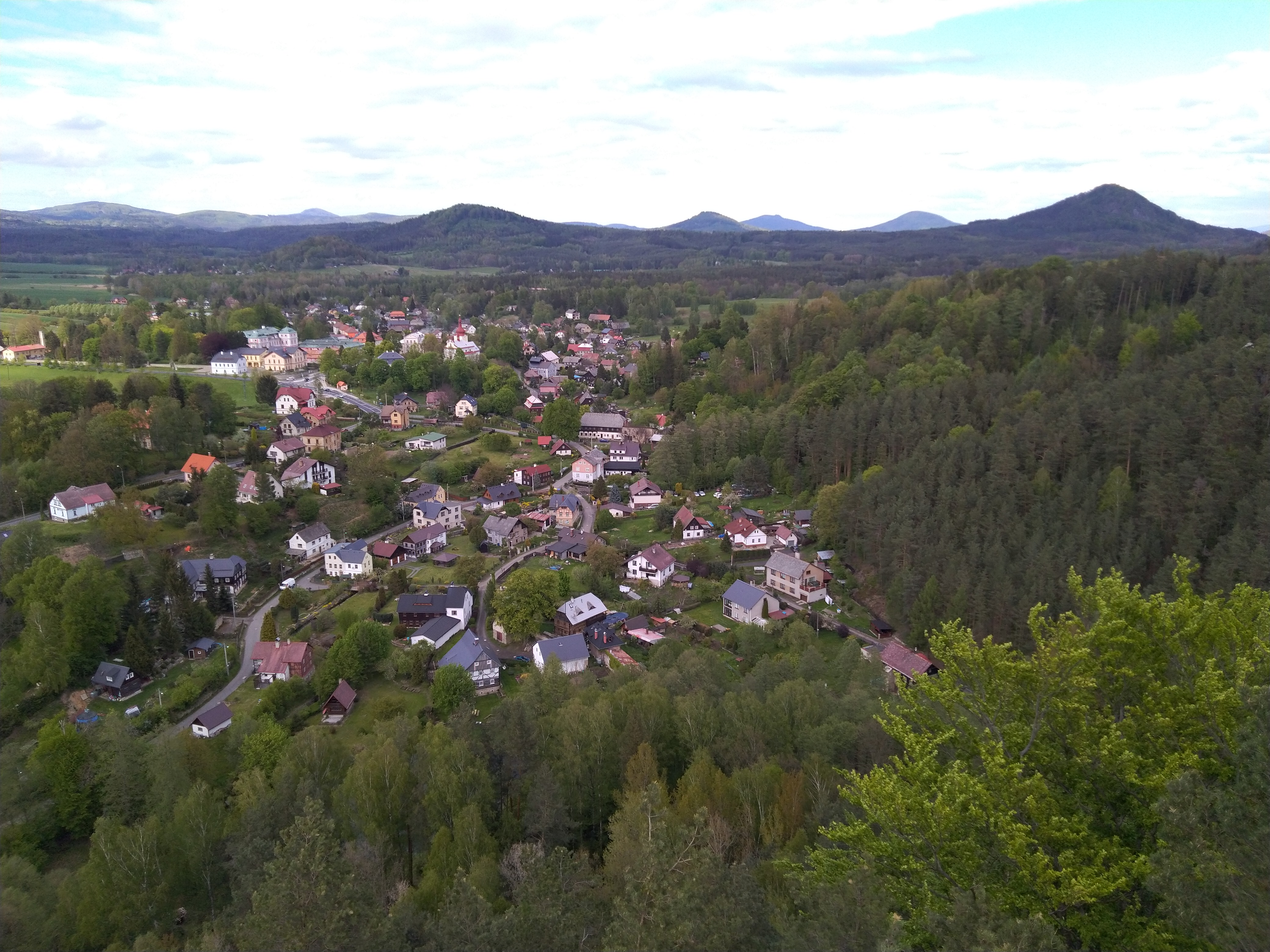 Sloup v Čechách from Na Stráži